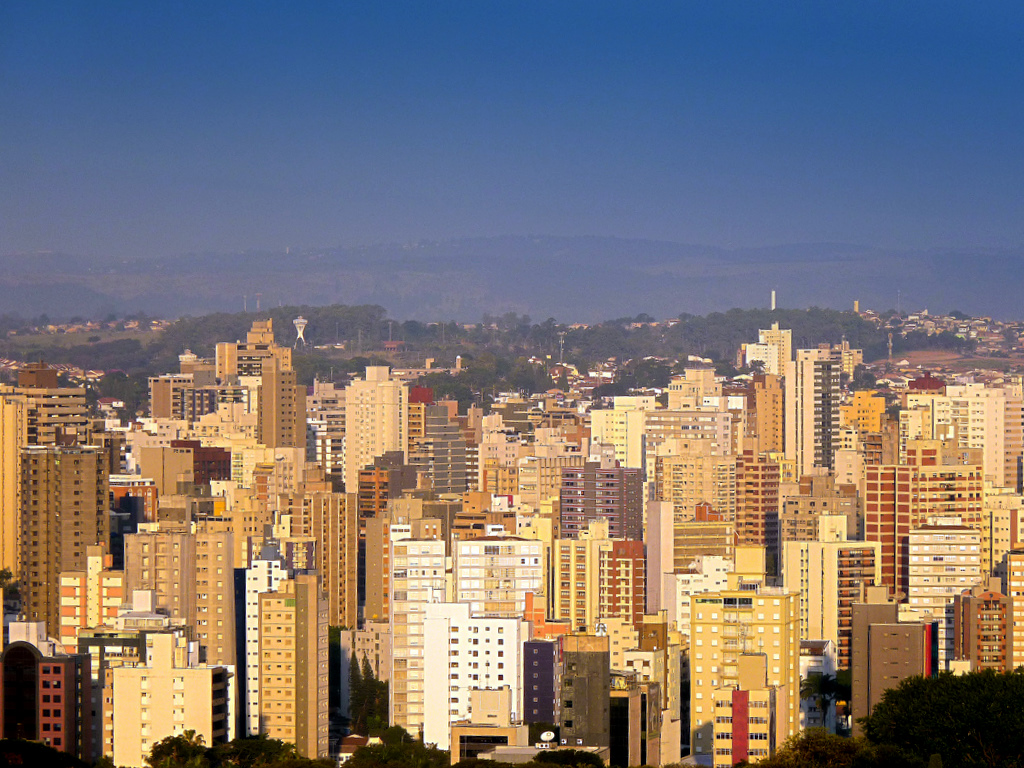 Vista de Campinas, no interior do estado de São Paulo, Brasil.